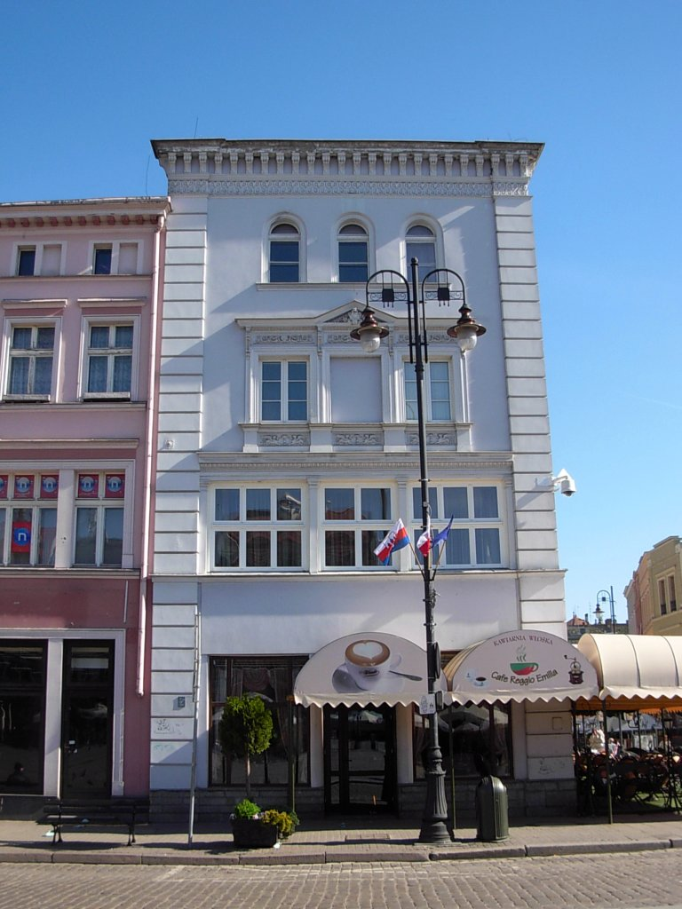 Kamienica Stary Rynek 7 w Bydgoszczy